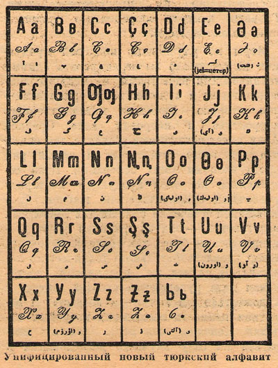 Janalifo kun tajpaj kaj kursivaj formoj de la literoj el iu lernolobro publikigita antaux la 1930-a jaro.